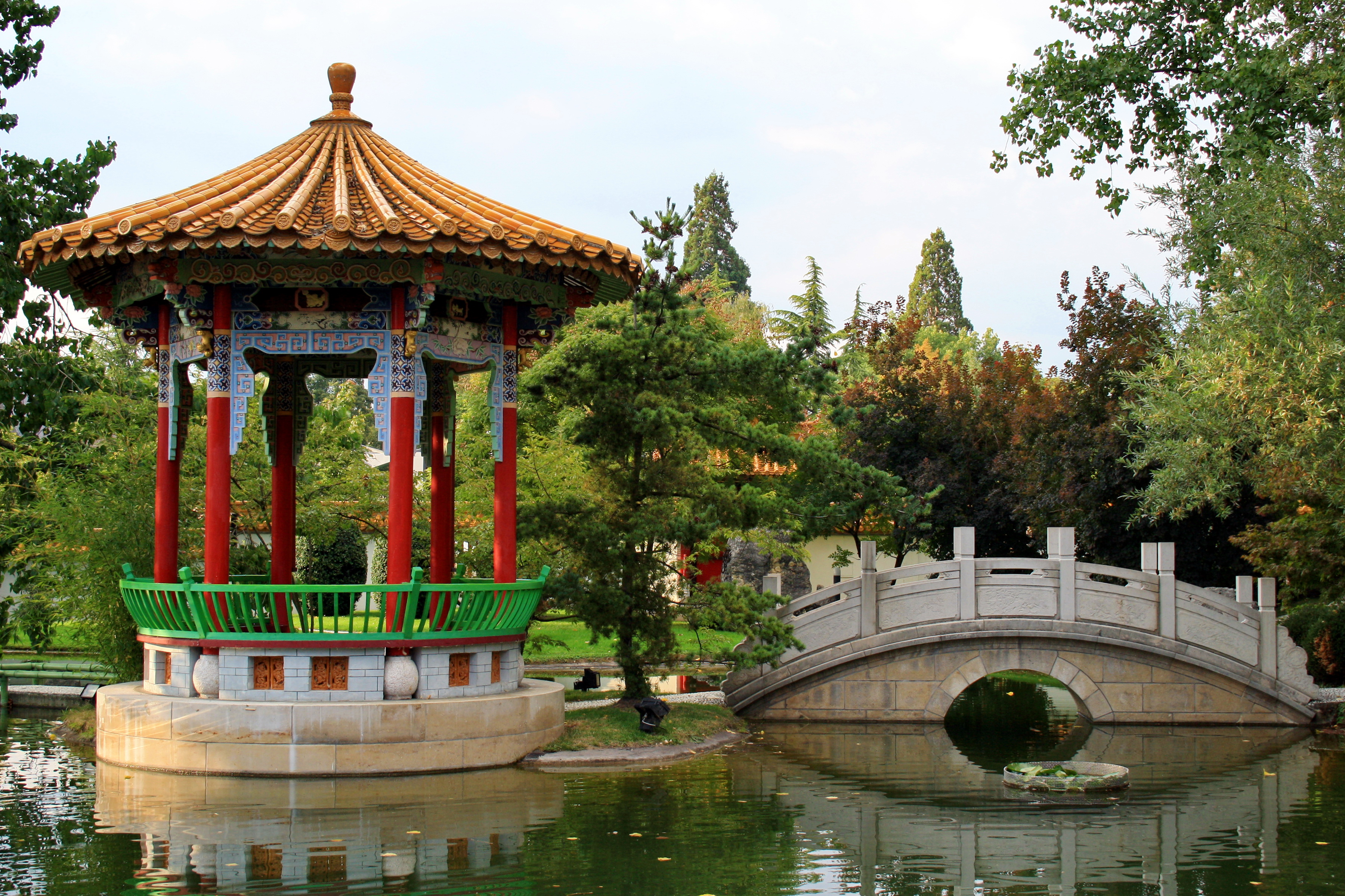 Island pavilion in Chinagarten Zürich (Switzerland)